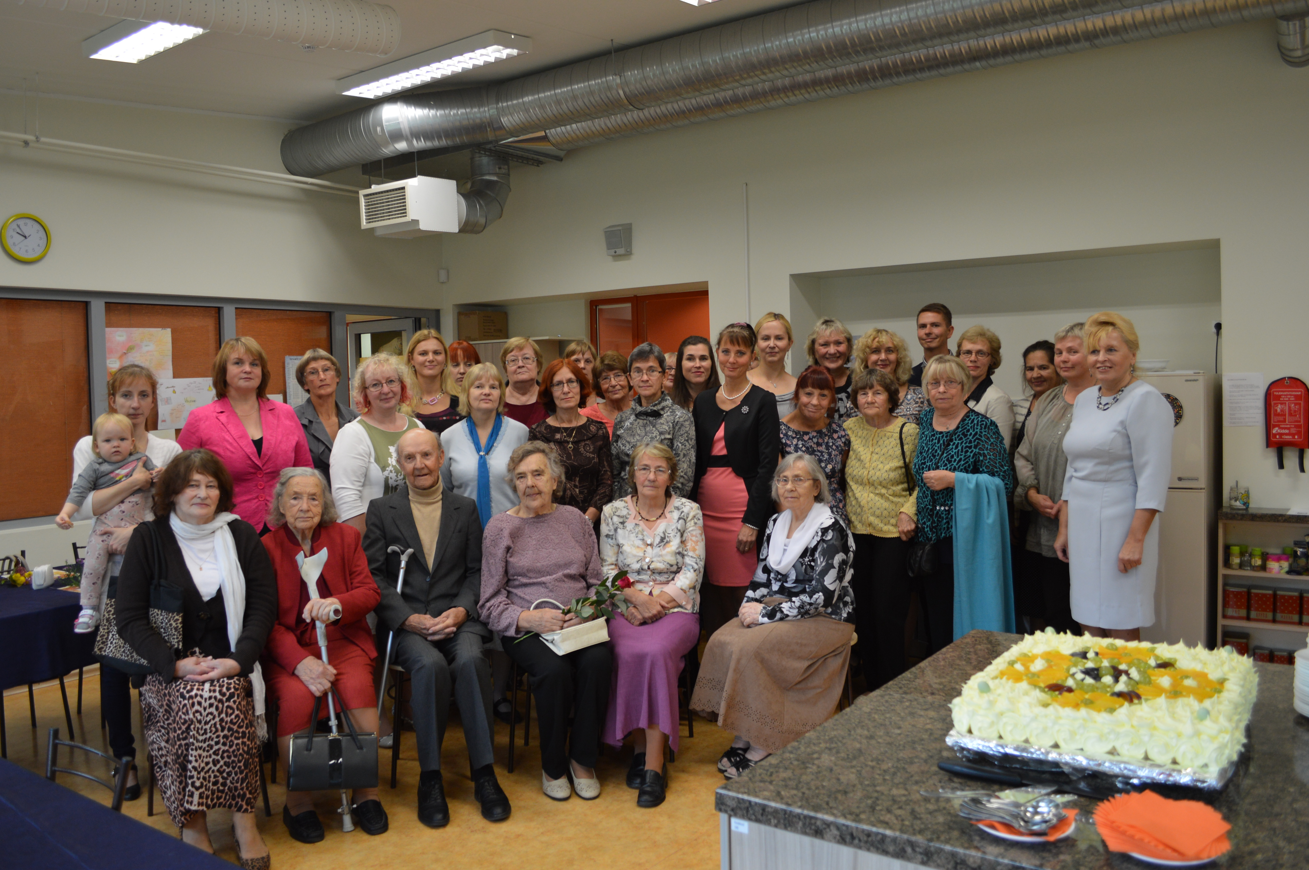 Sõprussidemed